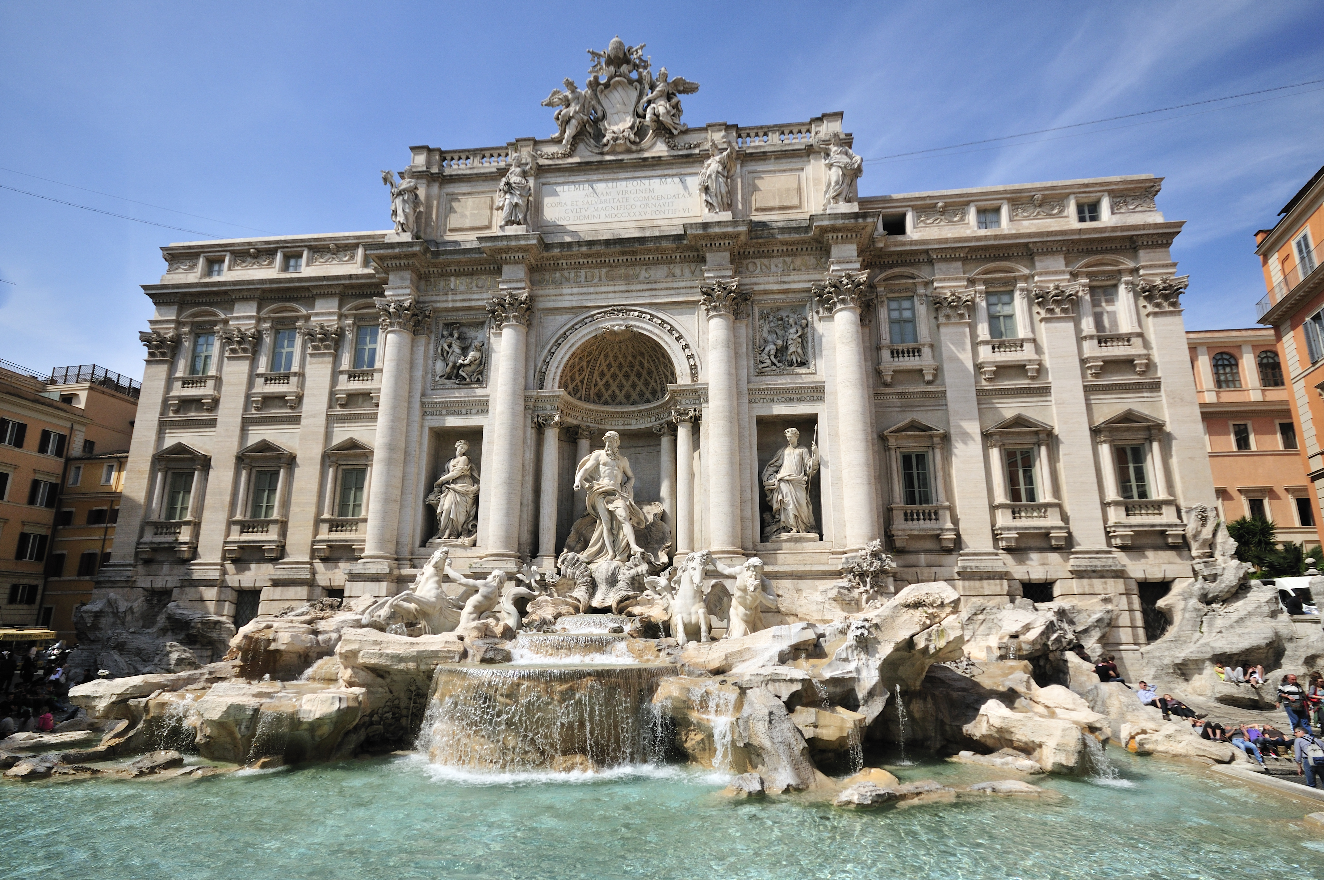 Fontana di Trevi